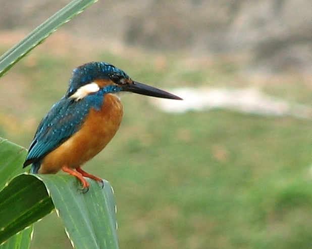 ചെറിയ മീൻ‍കൊത്തി (പൊന്മാൻ). കൊച്ചിയിൽ നിന്നും പകർത്തിയ ചിത്രം